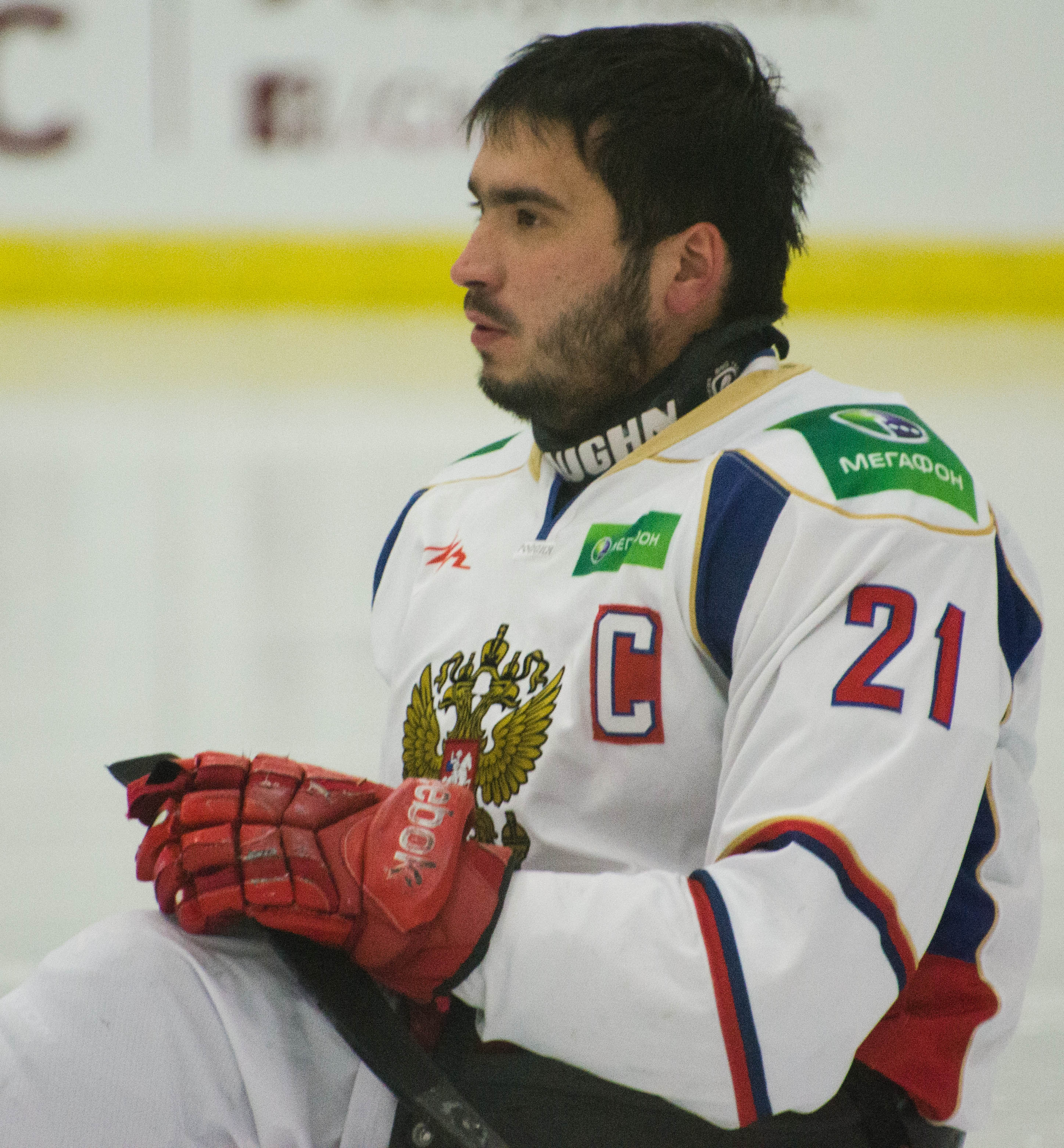 Evgeny Petrov, 2015